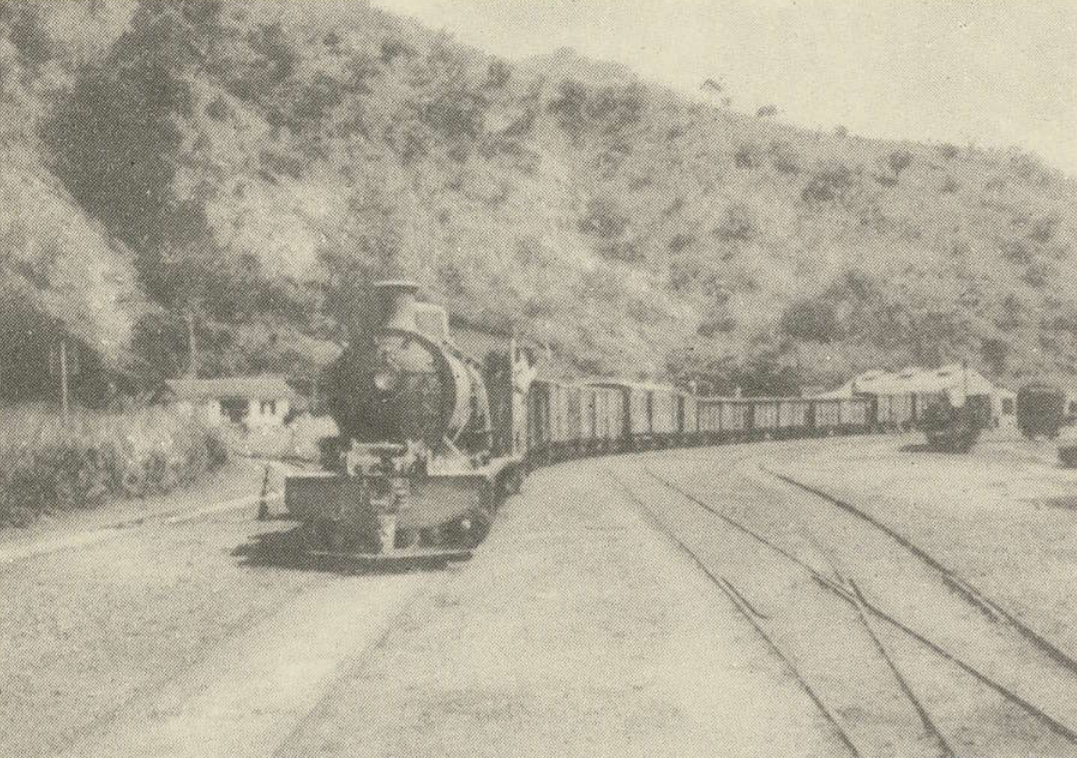 Chemin de fer du Kivu